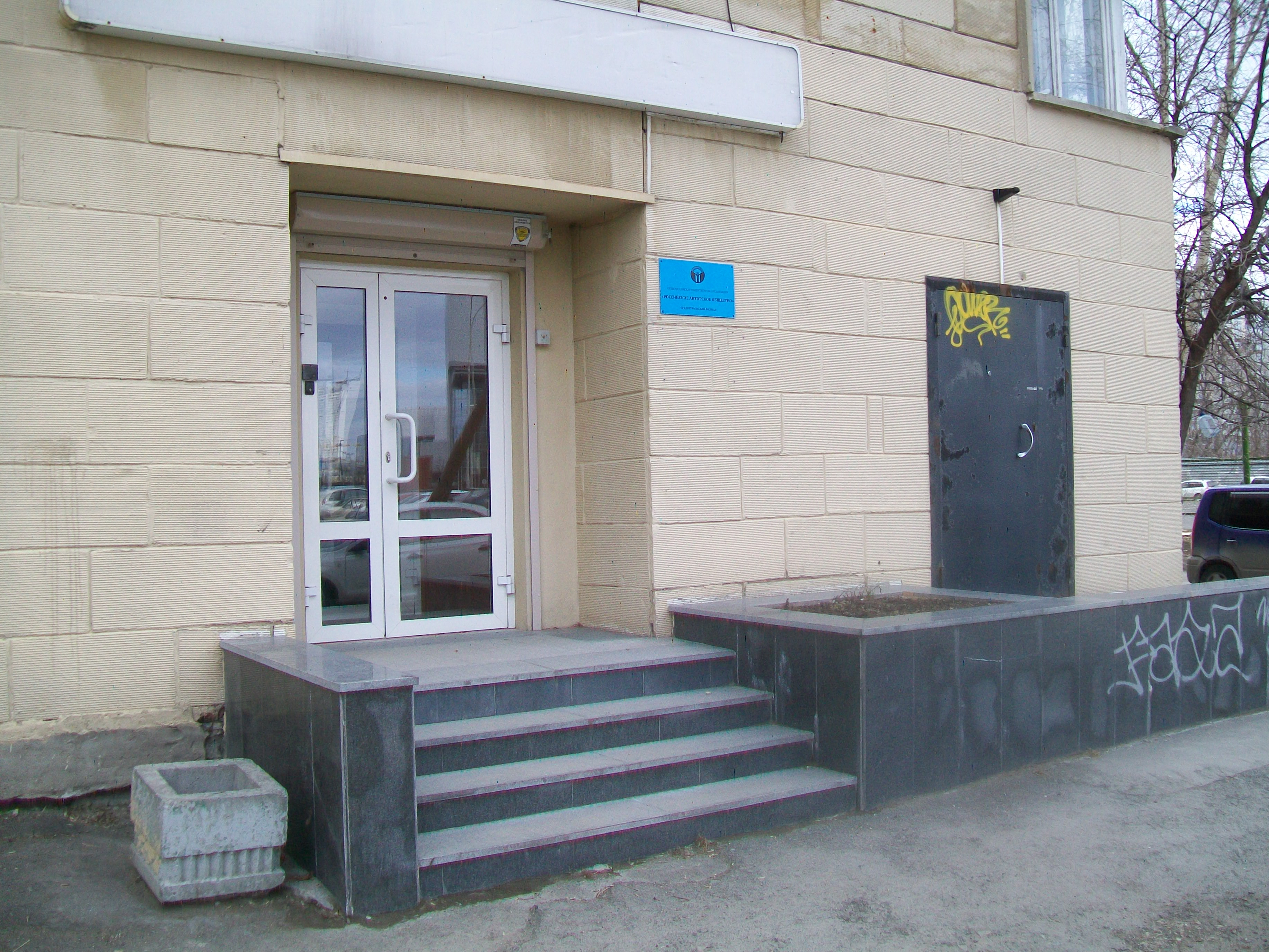 Среднеуральский филиал Российского авторского общества в Екатеринбурге, 21 апреля 2017 года